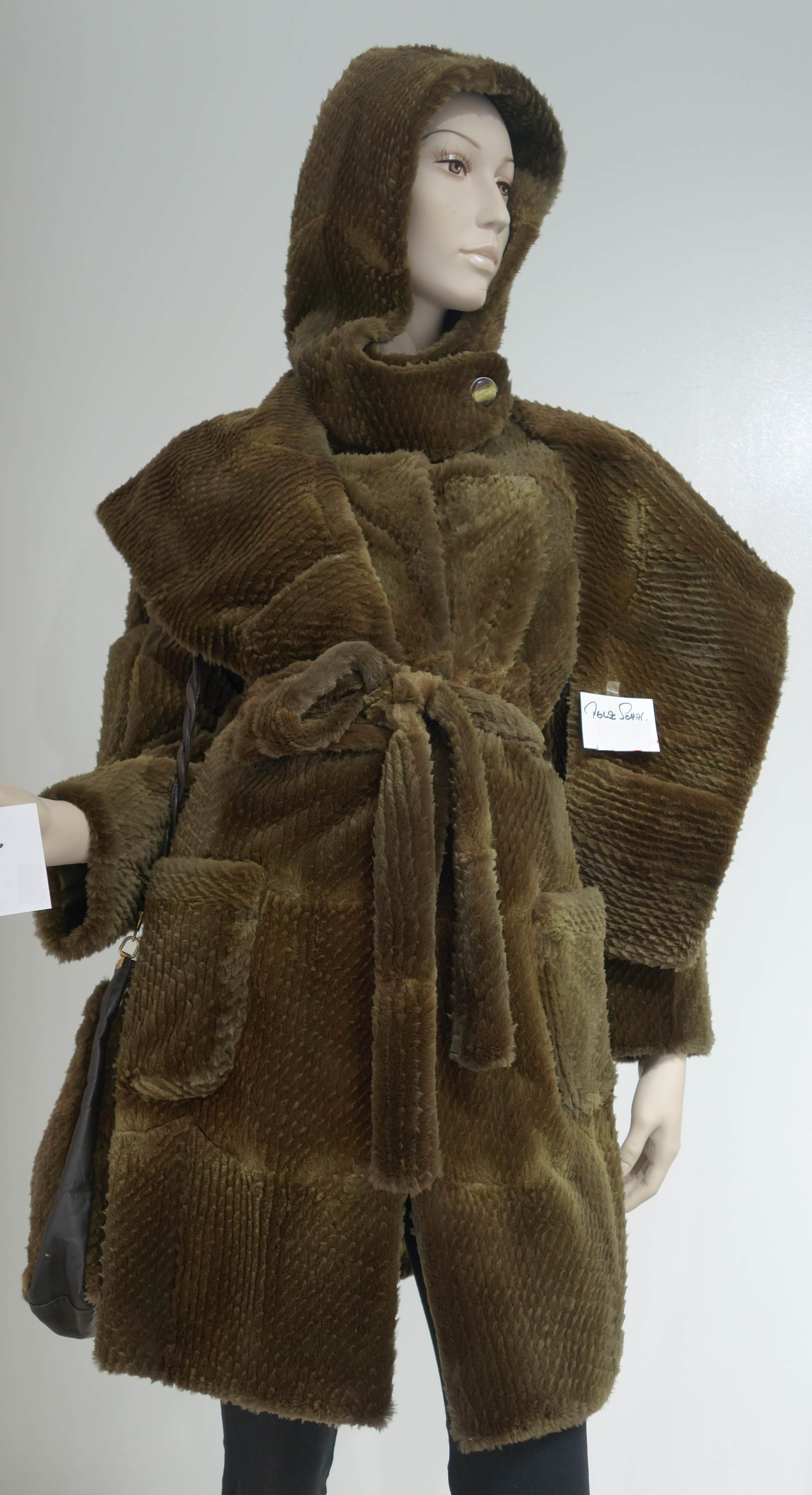 Bisamwammenmantel, gefärbt mit Effektschur. Gesehen im Pelzhaus Schenkenbach, Düsseldorf.